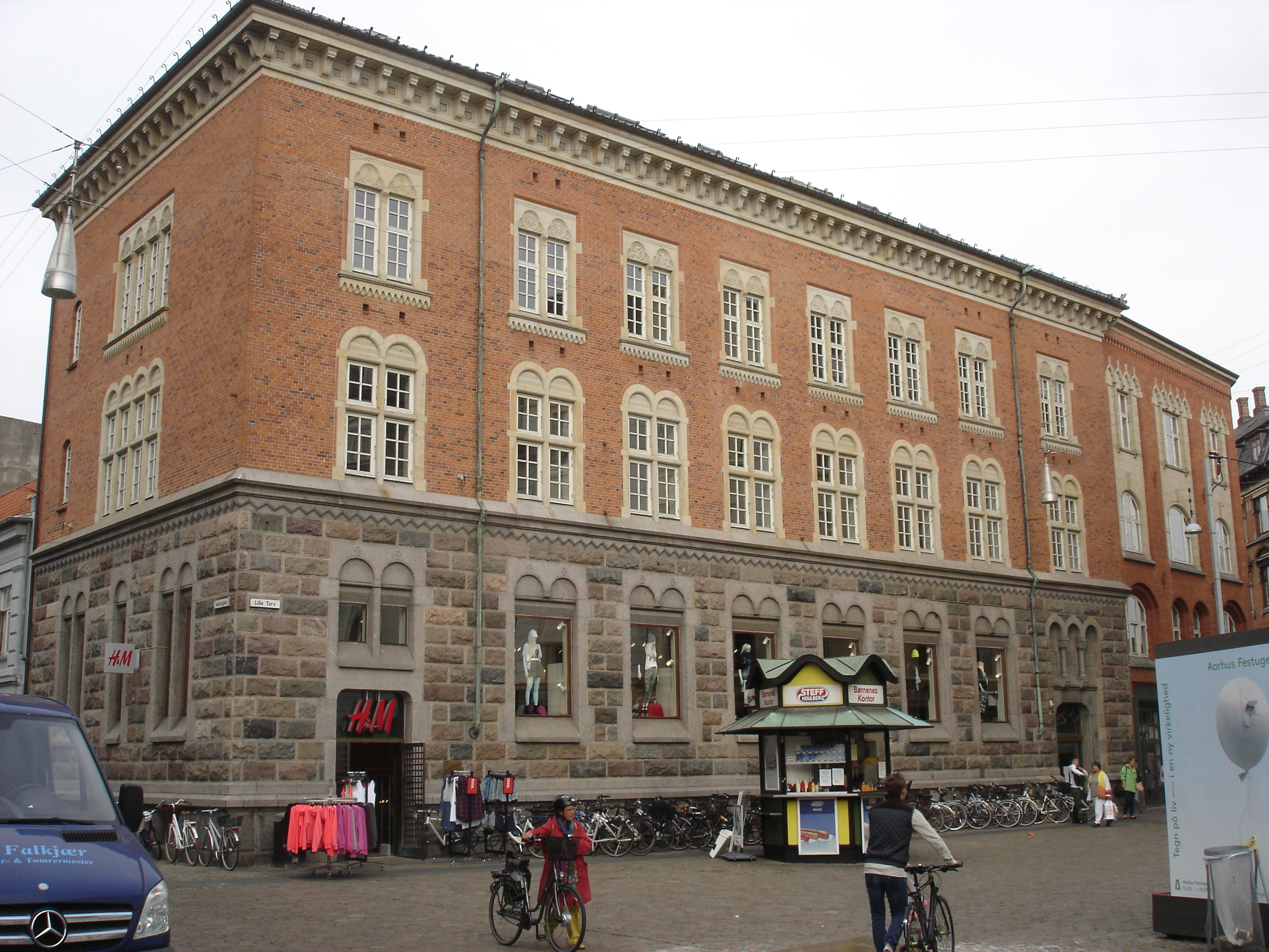 Kjøbenhavns Handelsbanks filial i Aarhus fra 1900